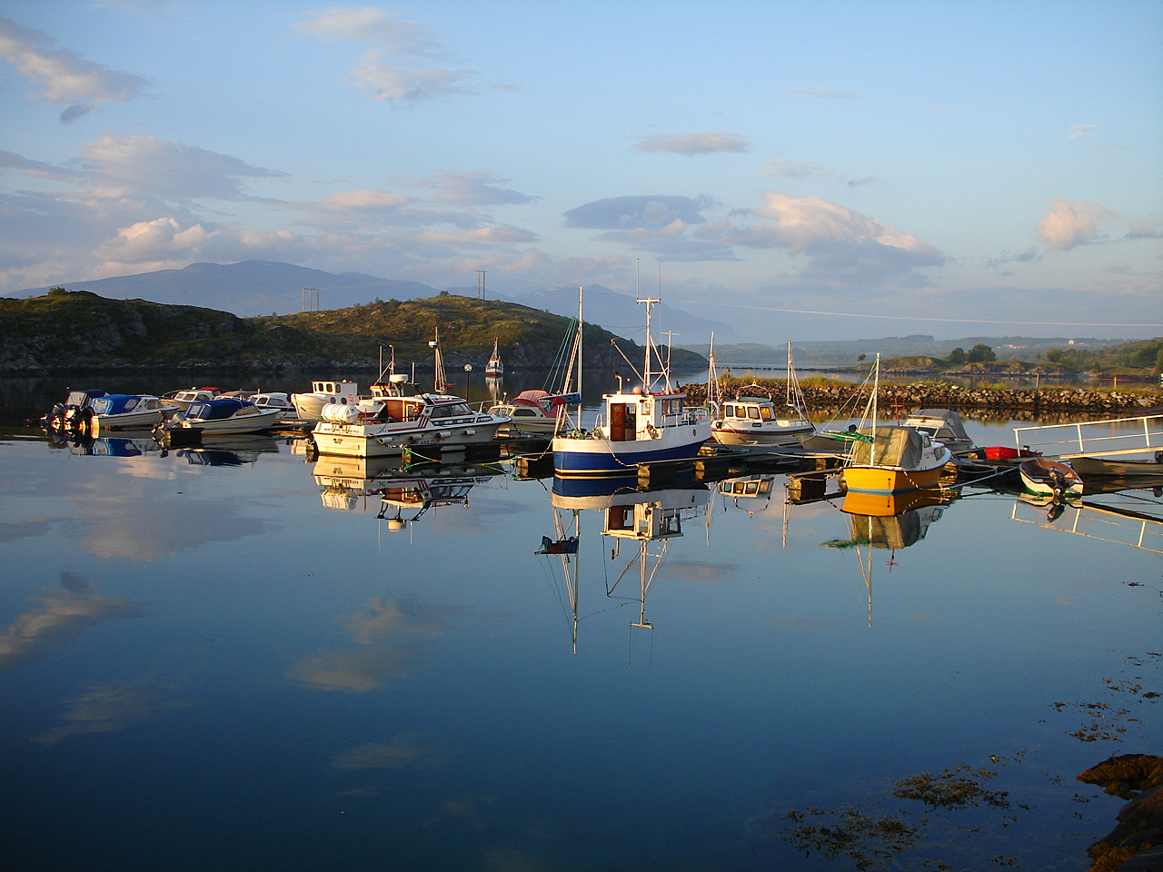 Mindland småbåthavn